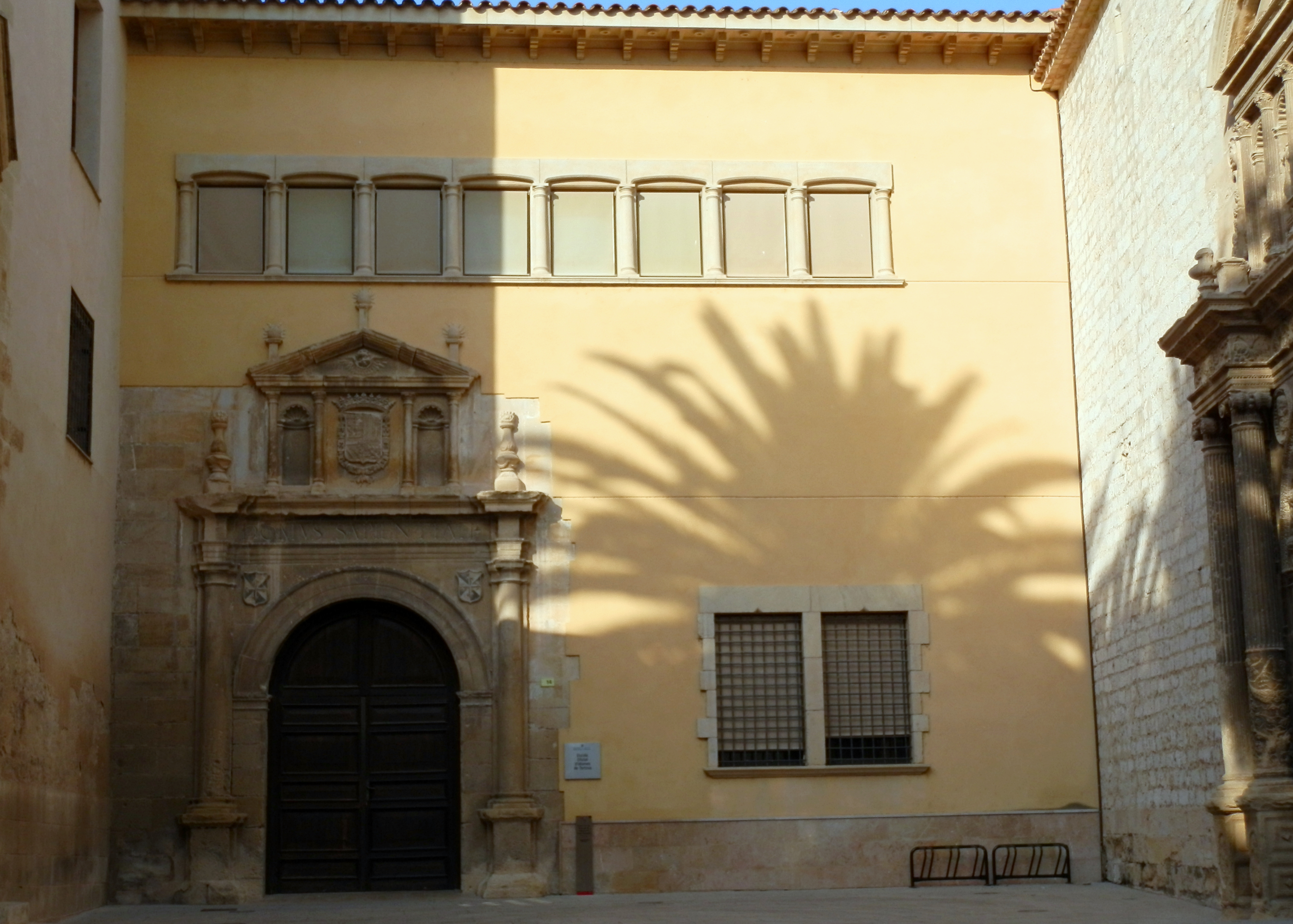 Fachada del Colegio de San Jorge y Santo Domingo (1578). A cada lado del arco de medio punto de la entrada figura la heráldica de los dominicos. Encima se puede leer la inscripción Domus Sapientae (Casa de la Sabiduría). El conjunto está coronado por el escudo de Felipe II.